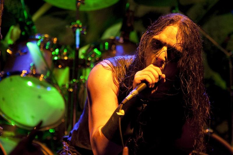 Marduk live at Hangar 110, 16/04/2010, São Paulo, Brasil